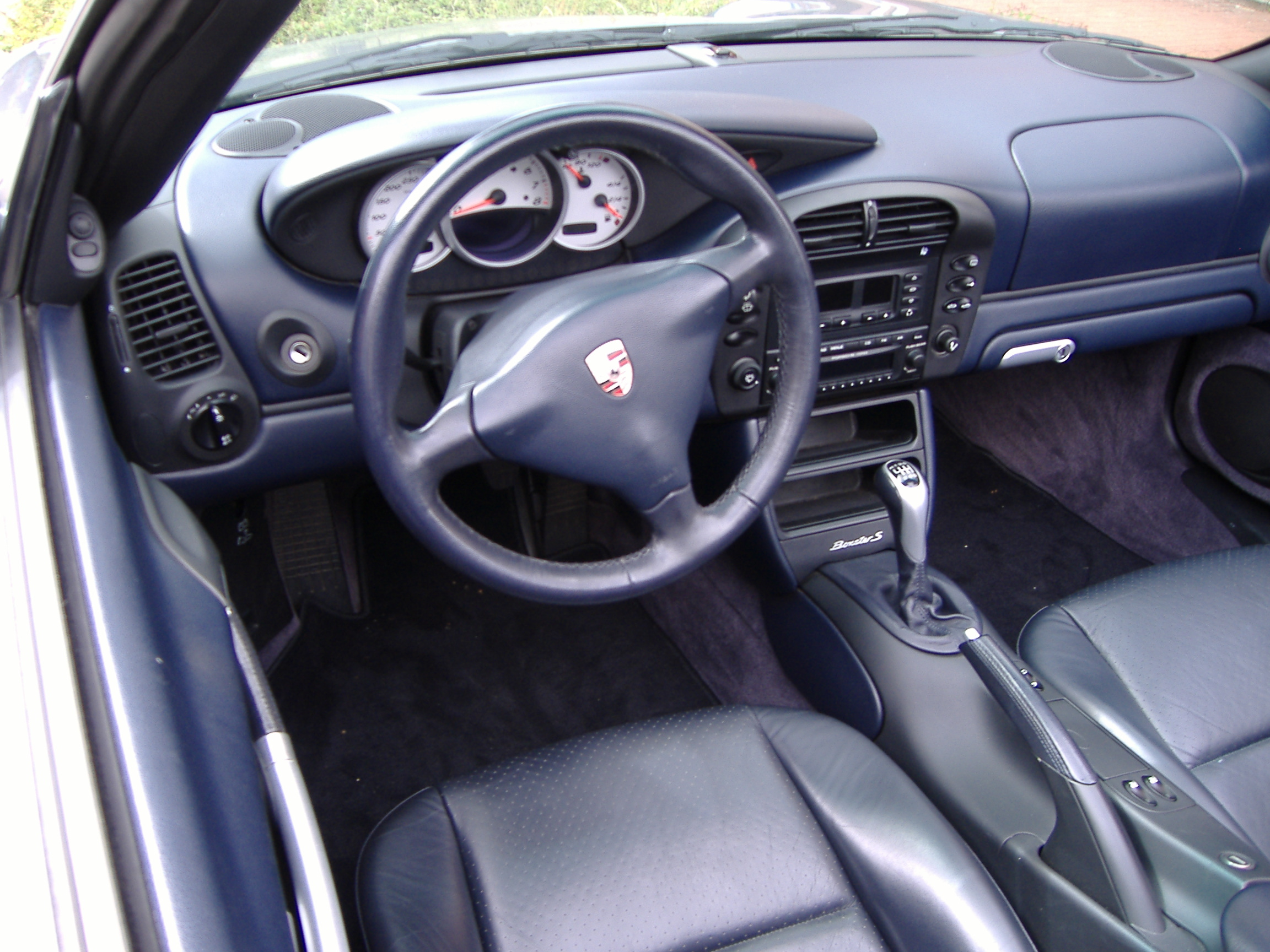 Porsche Boxster 986S Cockpit